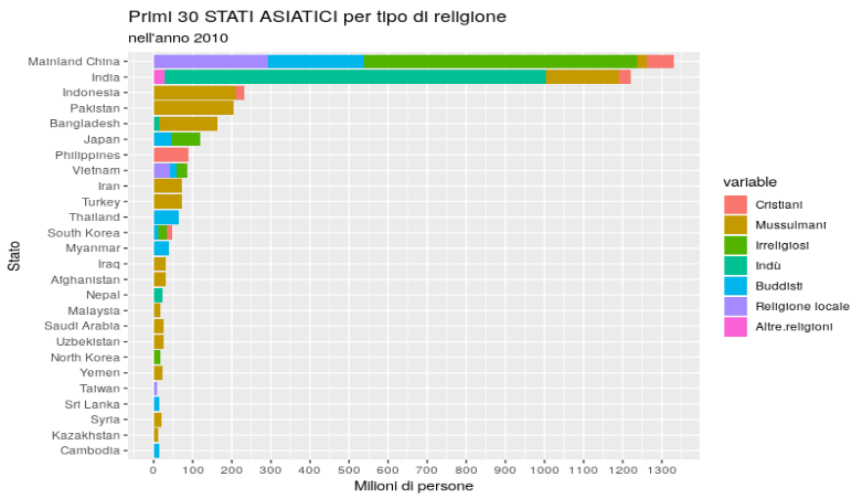 file realizzato con RStudio con i seguenti dati